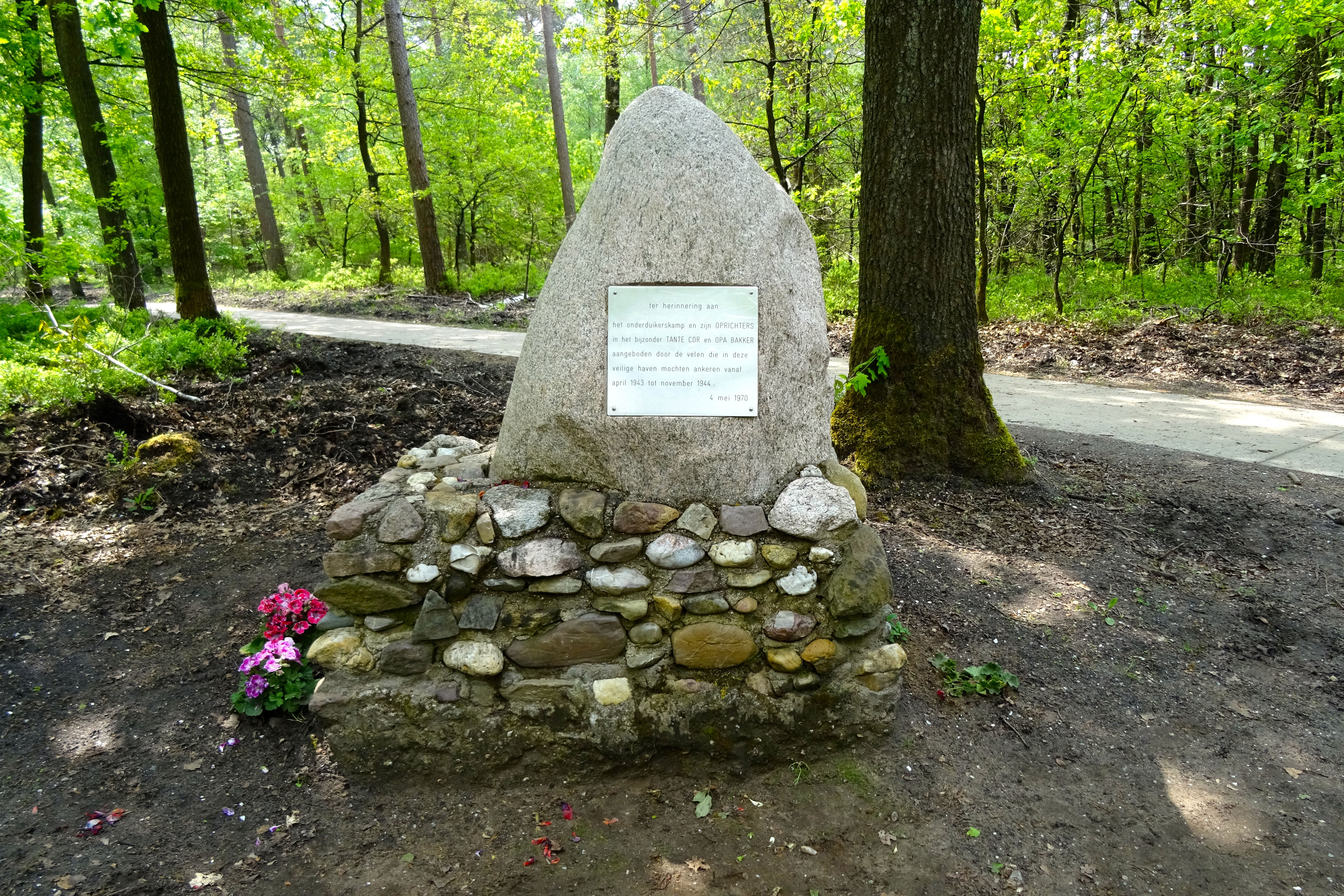 Monument bij het verscholen dorp nabij Vierhouten